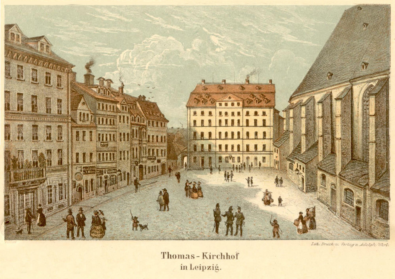 Die Südseite des Thomaskirchhofs in Leipzig mit der Thomasschule und dem Thomaspförtchen um 1850